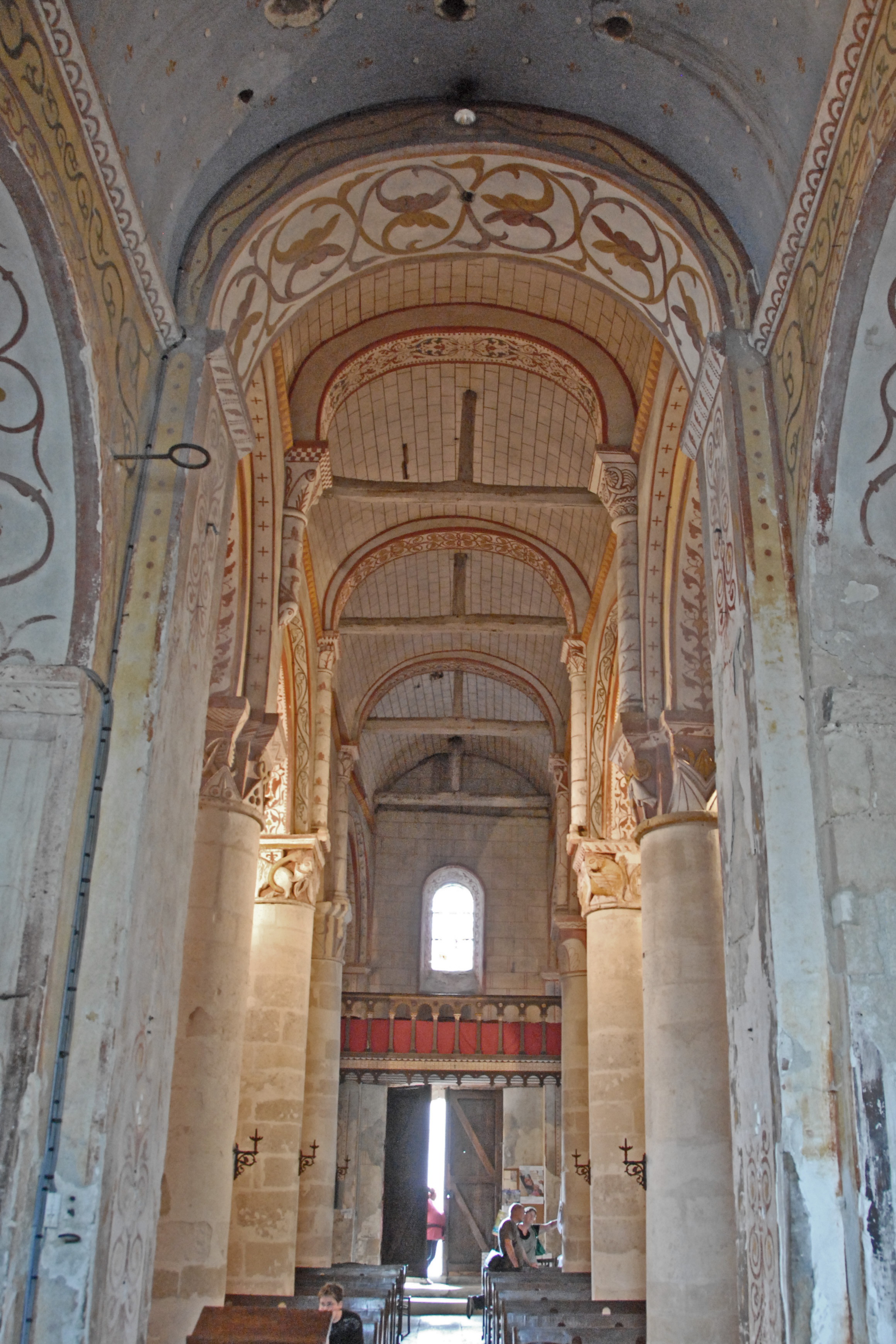 Civaux, Kirche, Mittelschiff, nach hinten